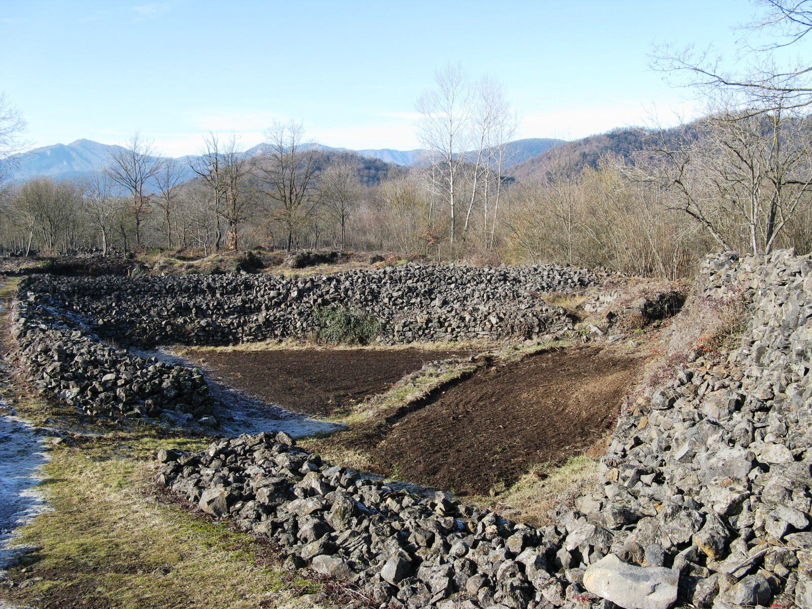 Vora Tosca (Catalunya / Olot, Les Preses)